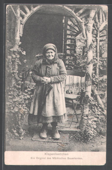 Kiepenlisettchen, Ein Original des Märkischen Sauerlandes.